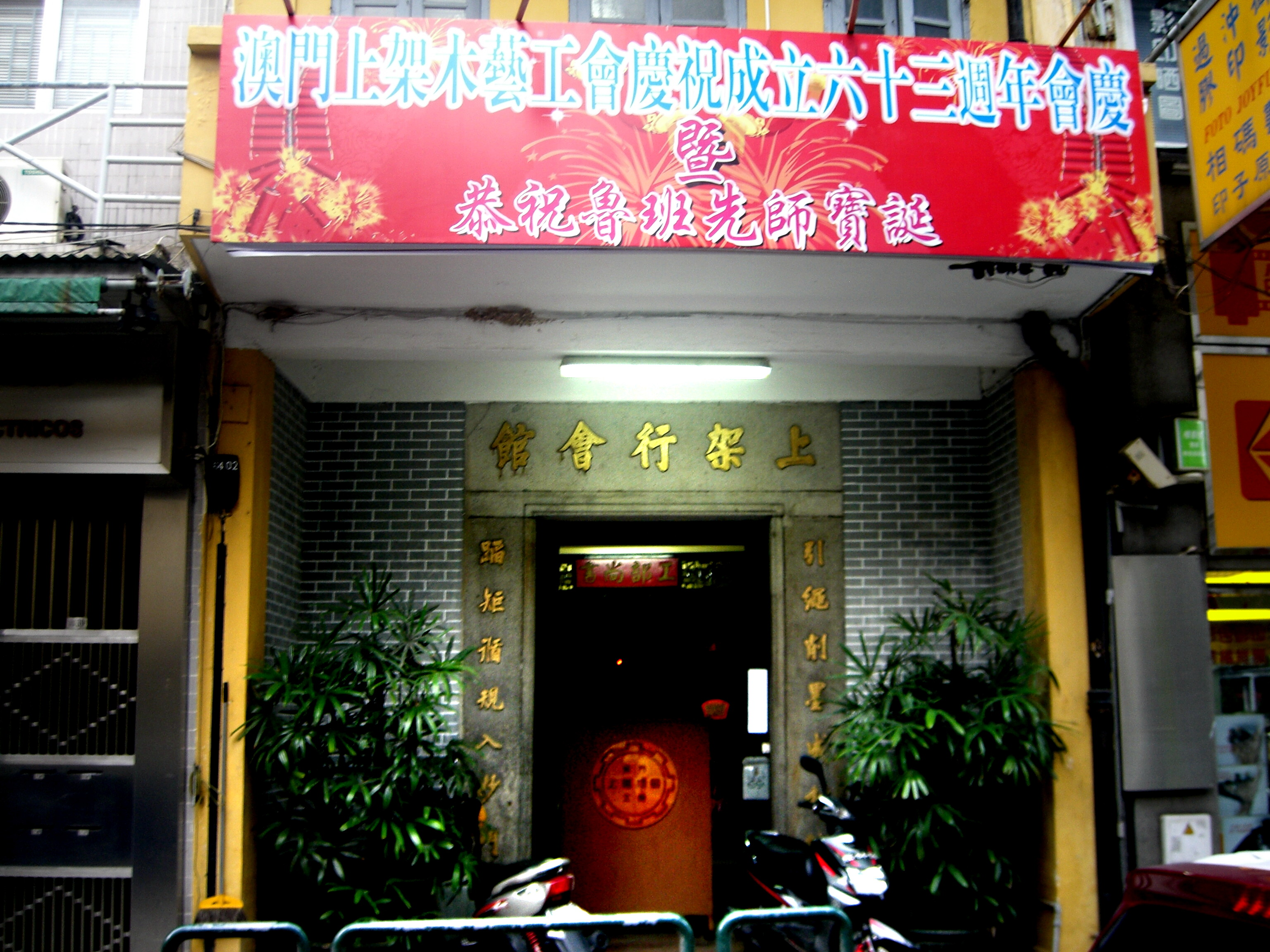 Associação Seong Ká Môk Ngai de Macau